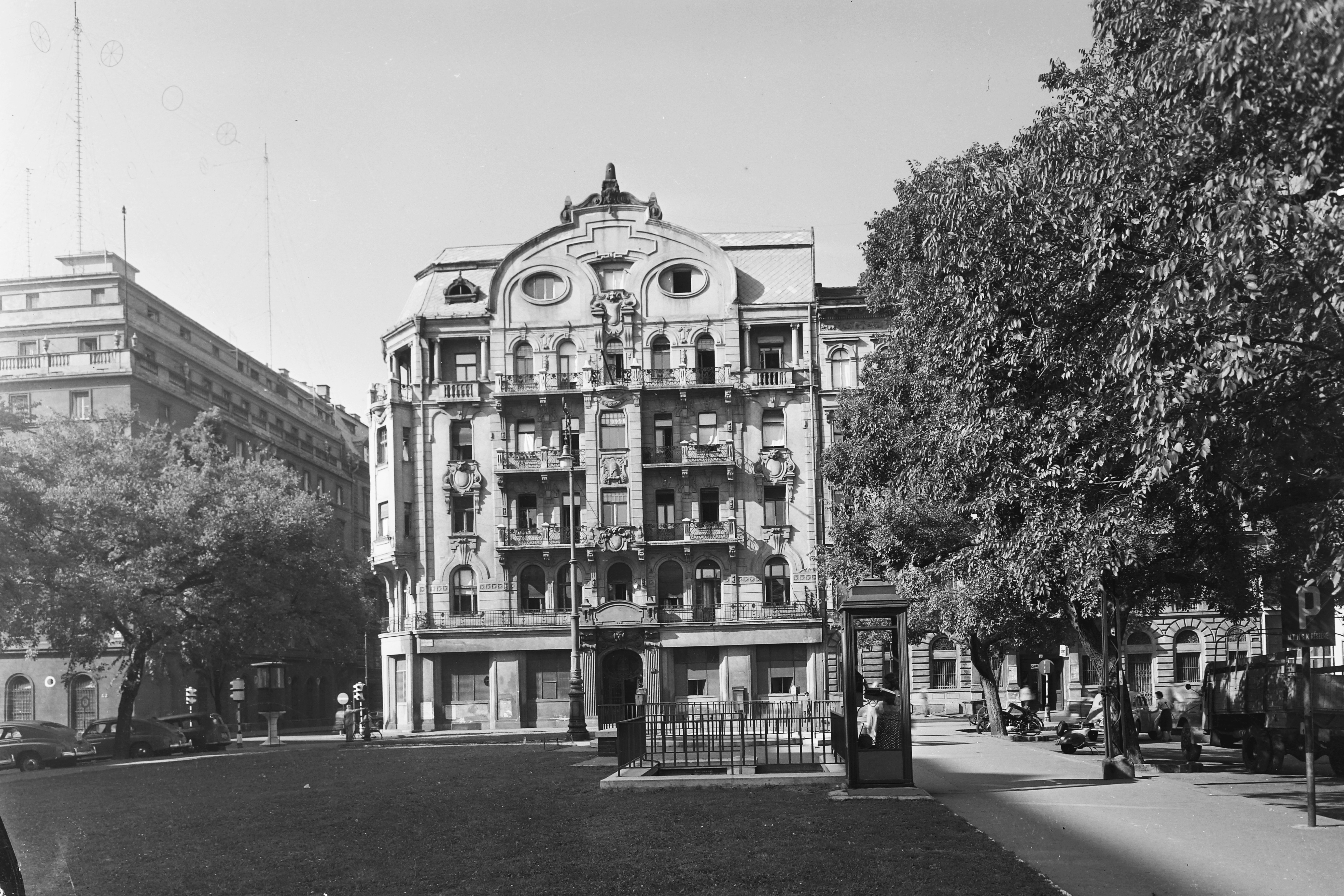 József Attila utca 8, József nádor tér. Location: Hungary, Budapest V. Tags: phone booth, Budapest Title: József nádor tér.